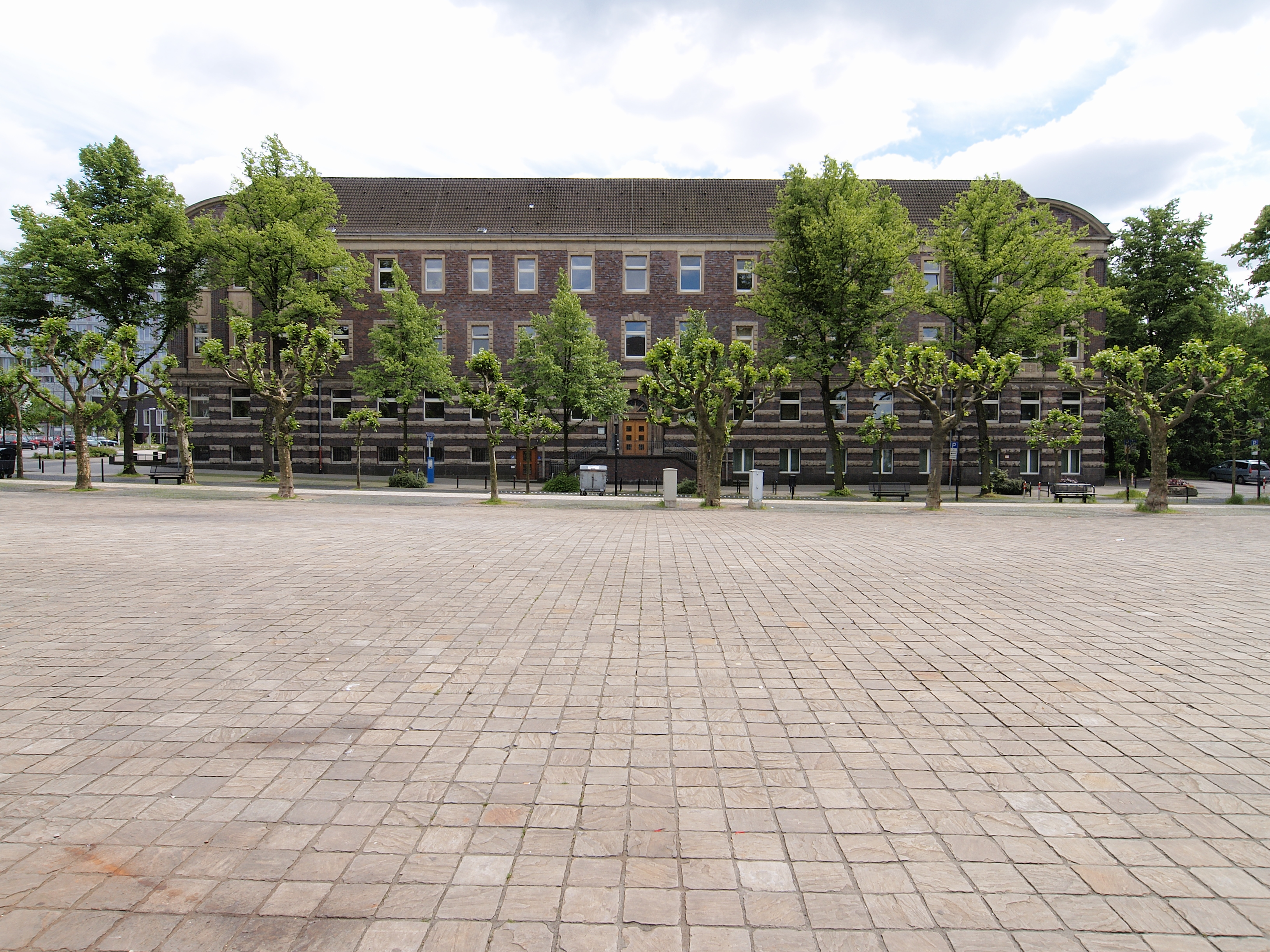 Amtsgericht Herne, Seite zum Friedrich-Ebert-Platz